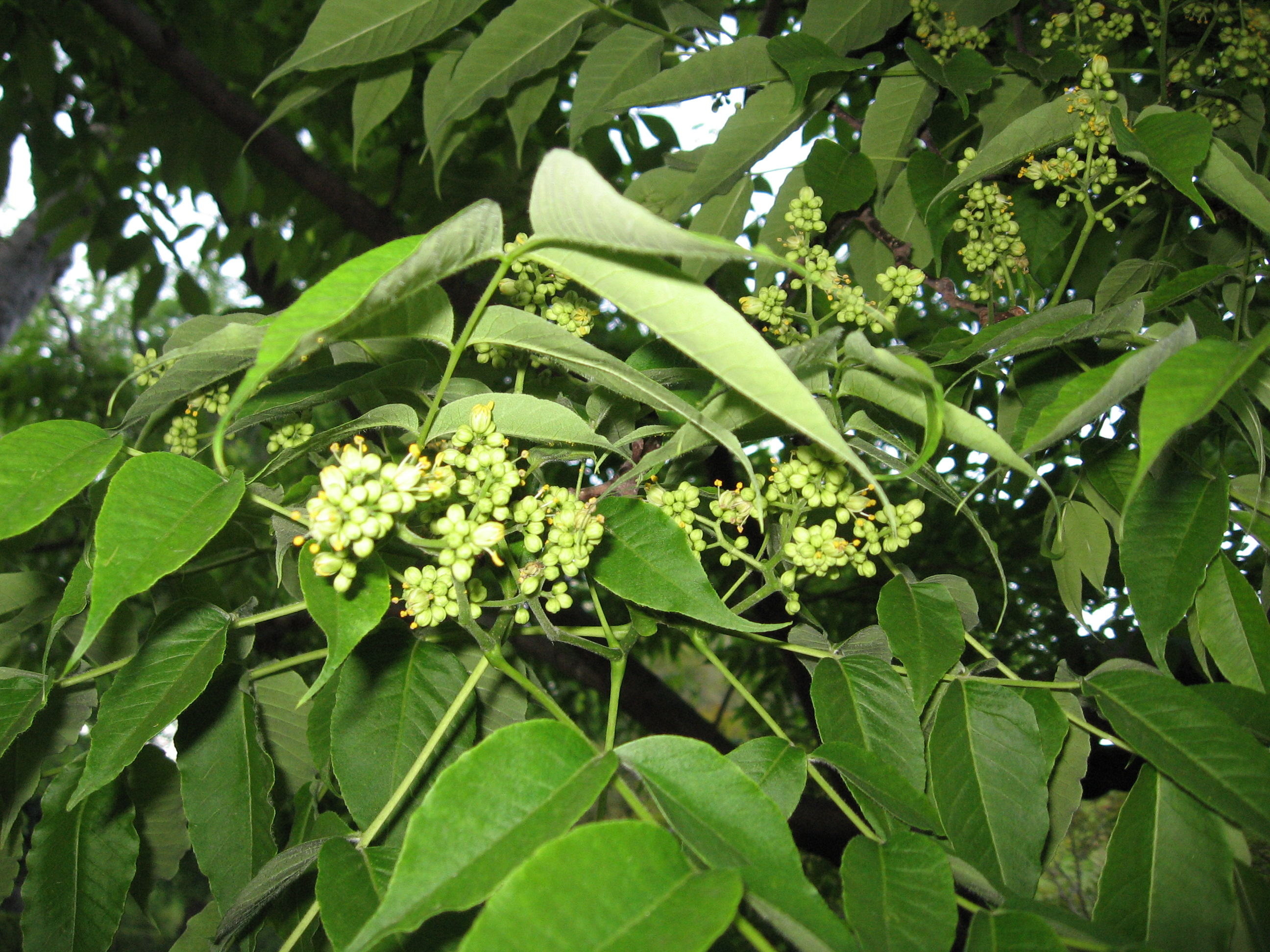 Phellodendron amurense, flores masculinas. Real Jardín Botánico de Madrid.